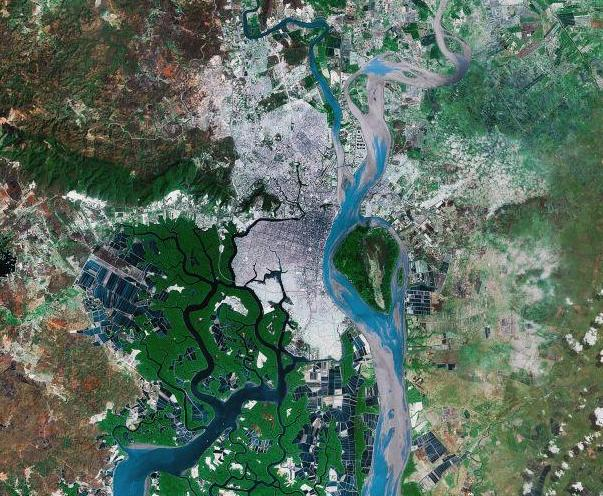 Imagen de Guayaquil por Satélite